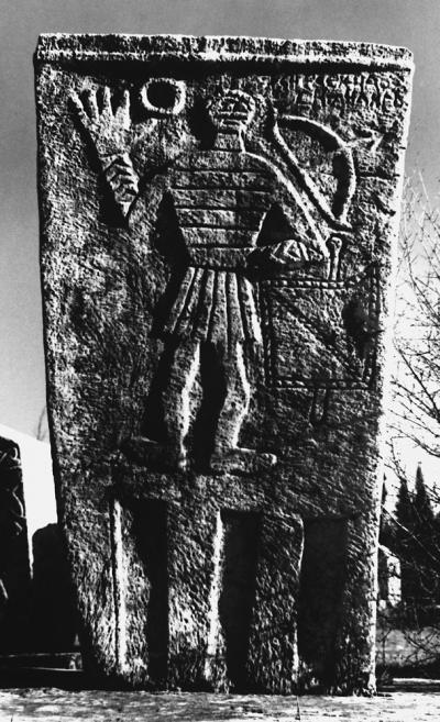 Srednjevjekovni tećak iz Širokog Brijega